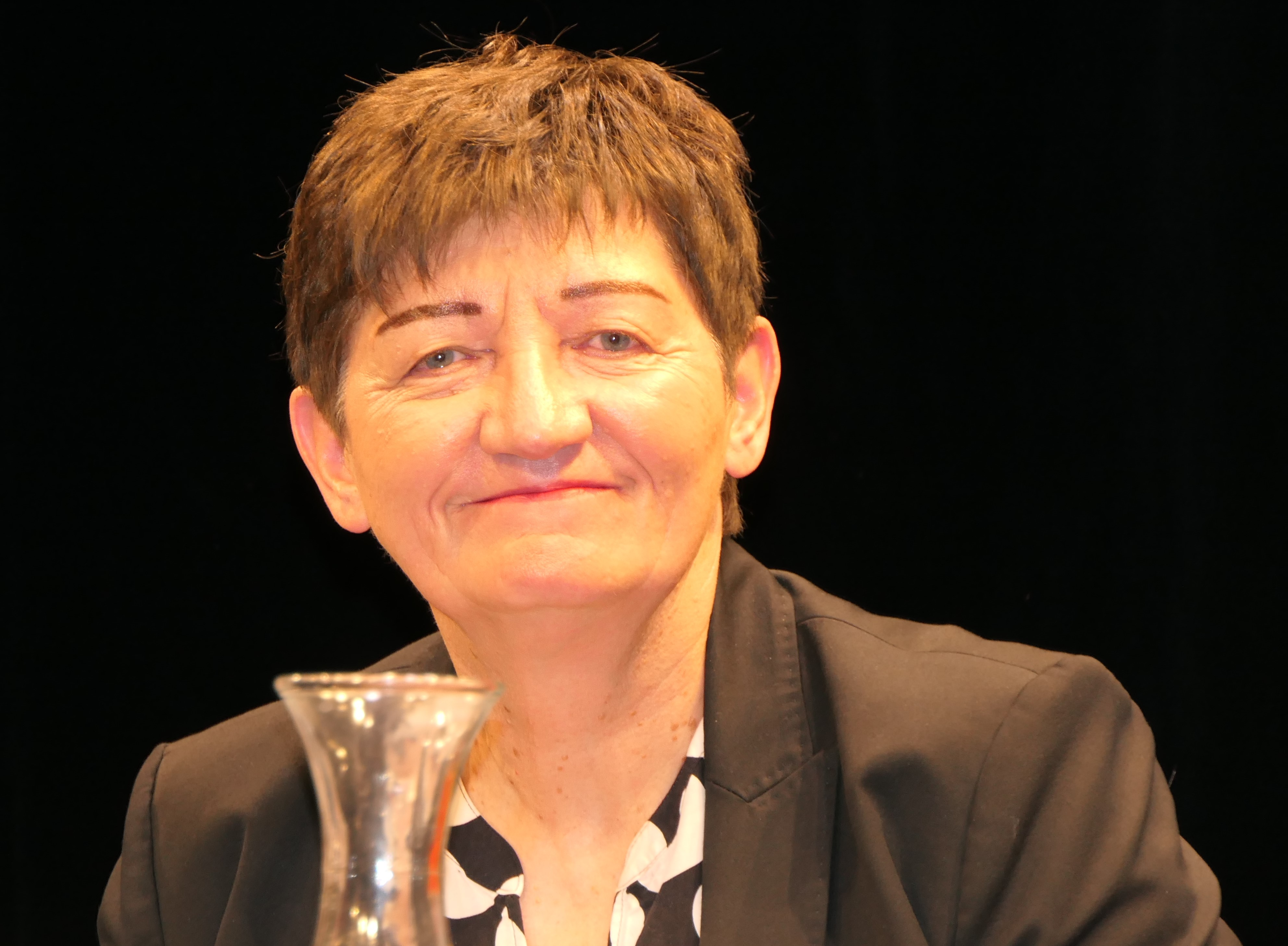 Cornelia Ernst auf einer Podiumsdiskussion zur Europawahl 2019 in Dresden